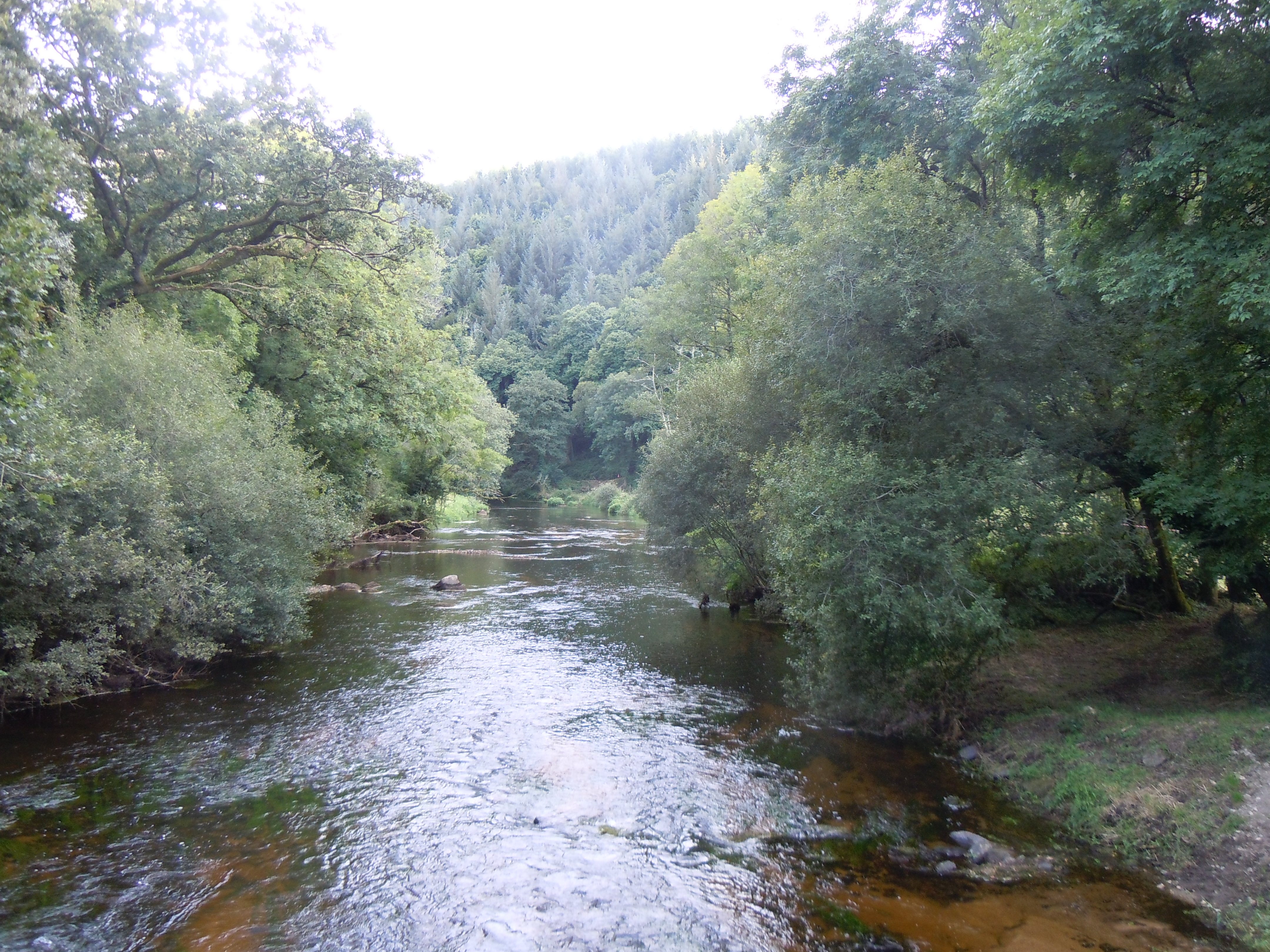 Le Scorff au pont du Stang (communes de Plouay et Guilligomarc'h départements du Morbihan et du Finistère)